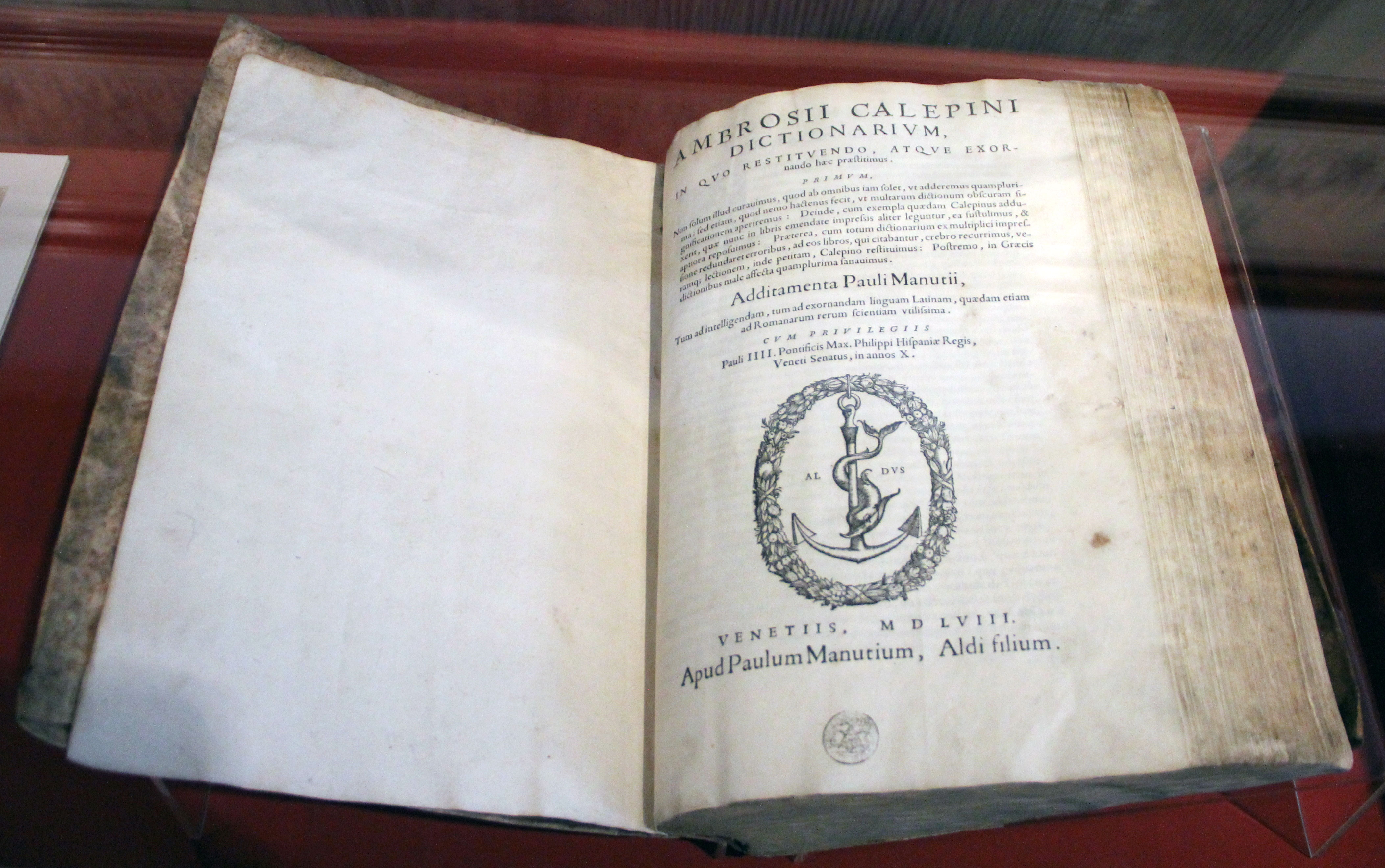 Dictionnaire d'Ambroise Calepin !558